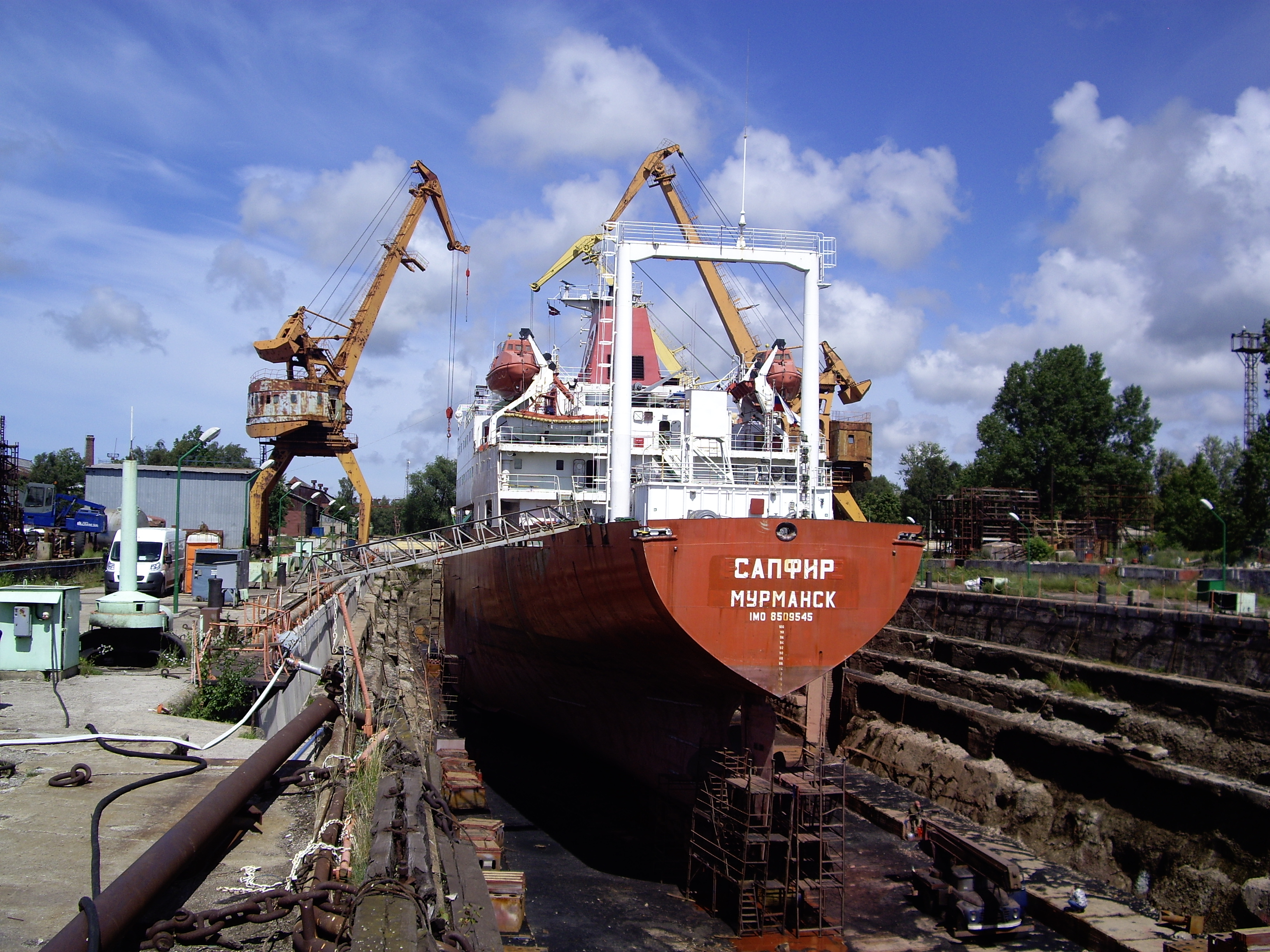 сухой док 2